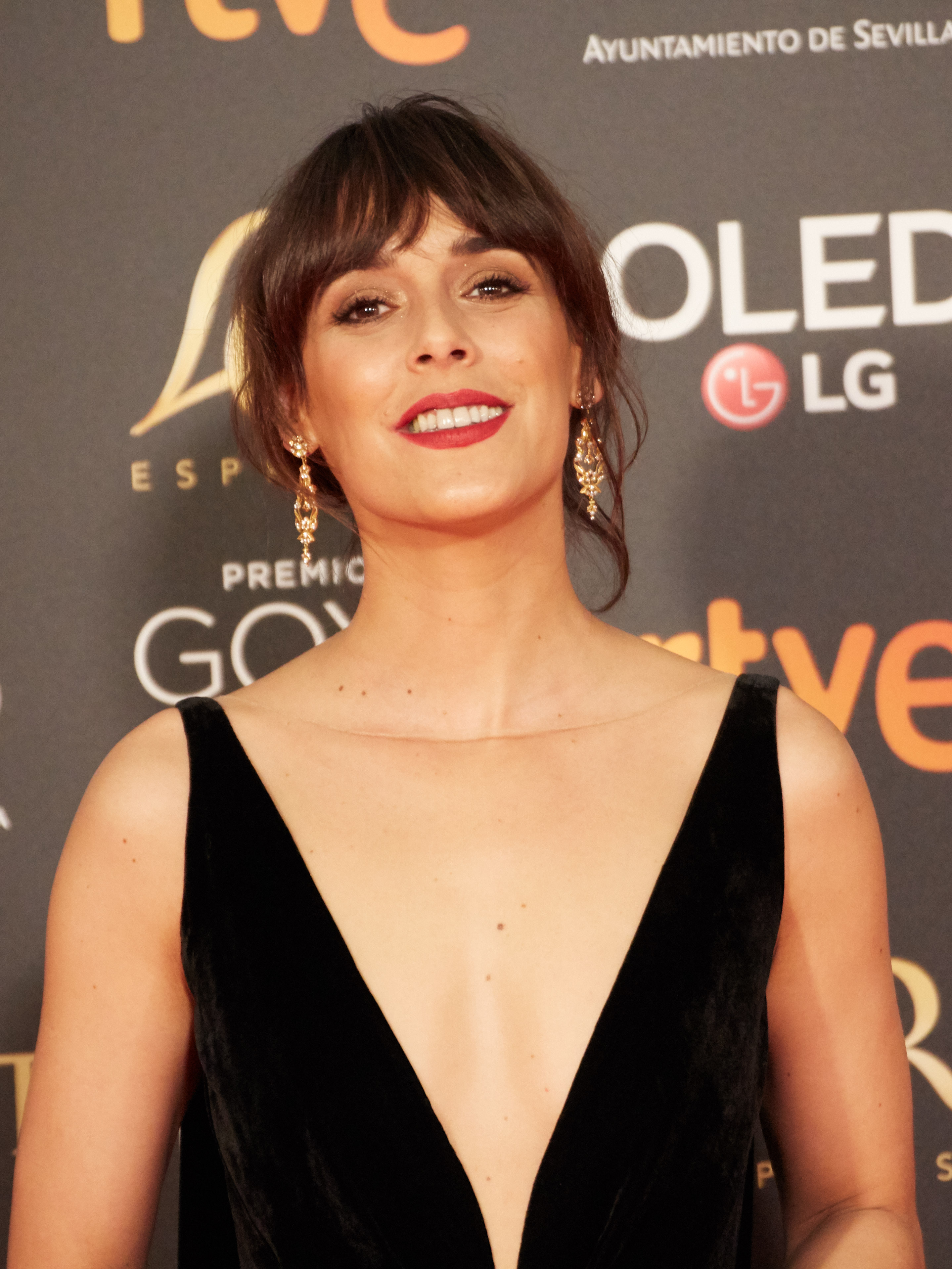 en la alfombra roja de los Premios Goya celebrados en Sevilla en Febrero 2019